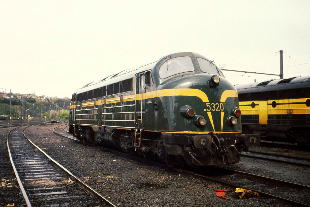 Locomotive 5320 - 1990-04-16 - Ronet